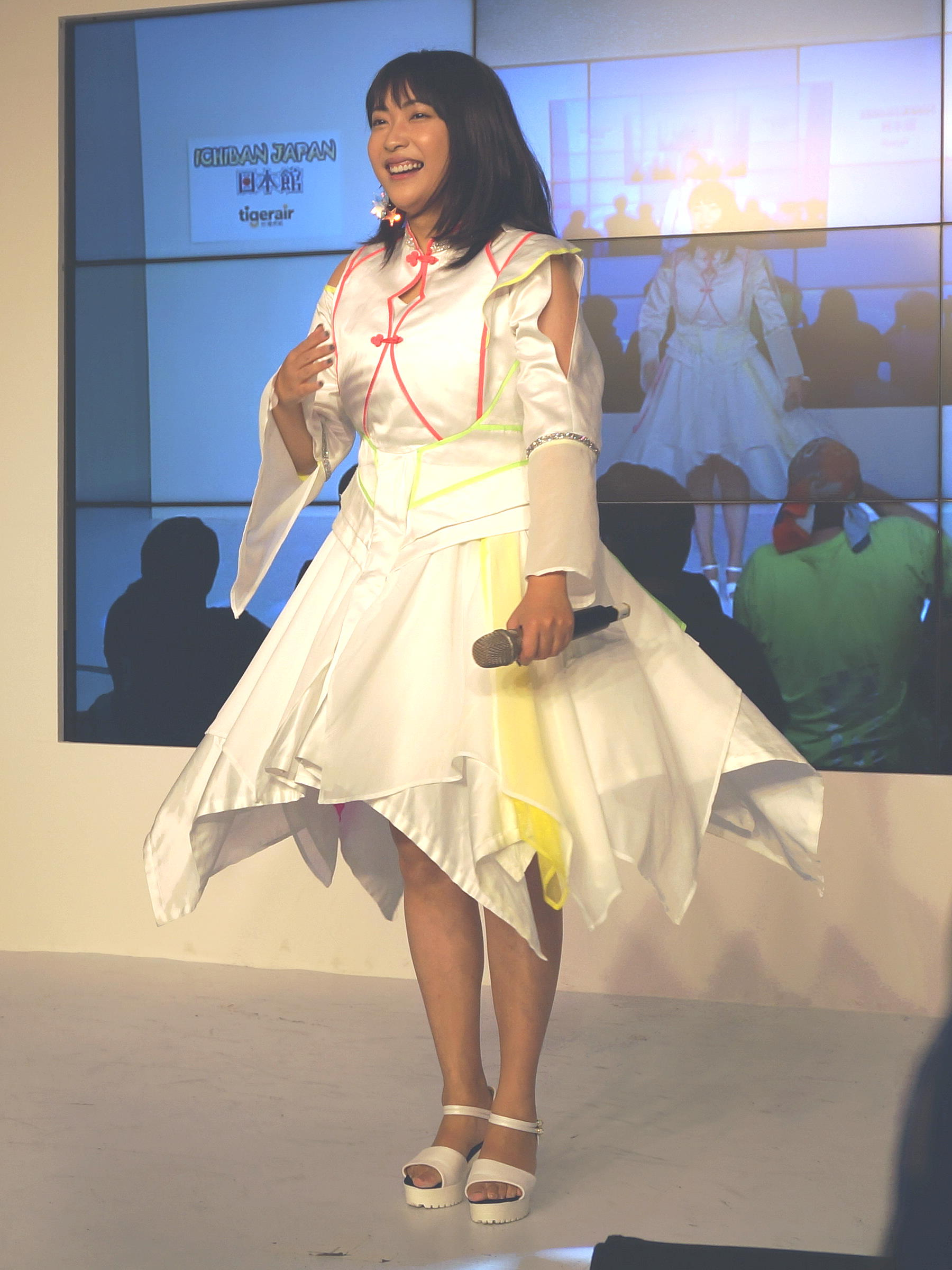 第20屆漫畫博覽會日本館舞台，日本在地偶像Miraiskirt唯一成員兒島真理奈舞台秀。